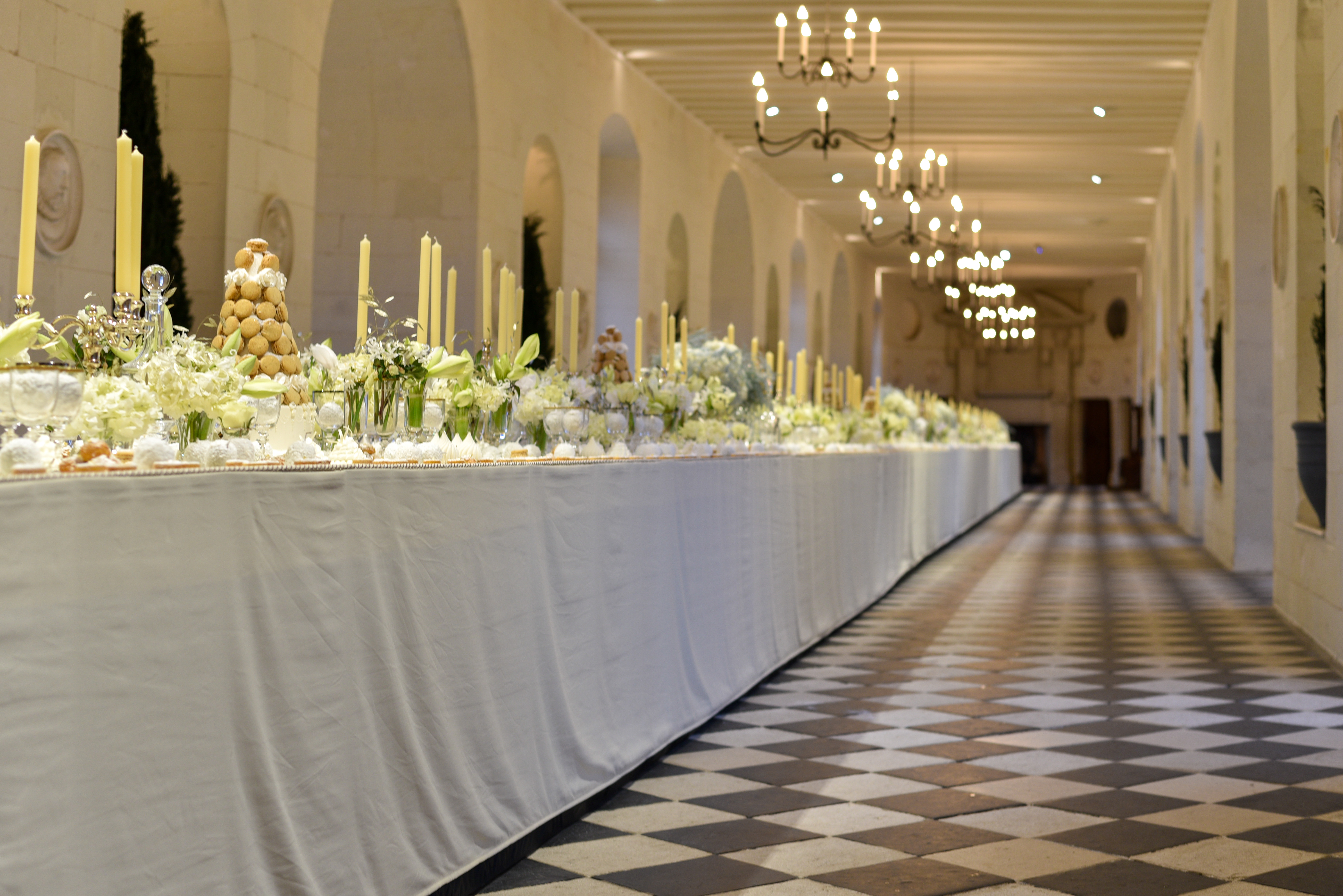 Noël Médicis au château de Chenonceau